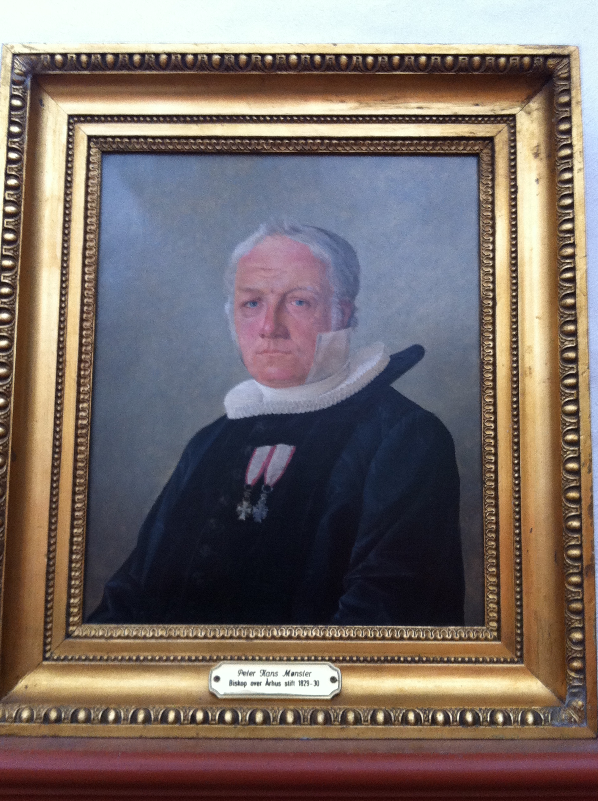 H. P Mønster, Biskop Aarhus Stift 1829-30